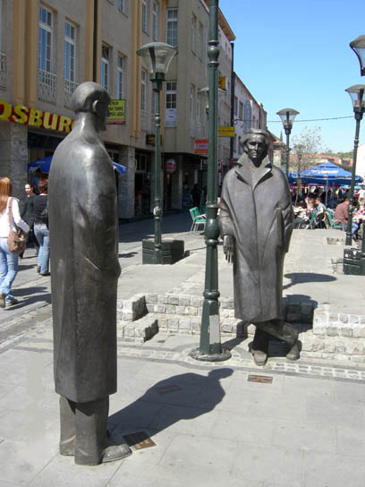 Spomenici piscu Mesi Selimovicu i slikaru Ismetu Mujezinovica